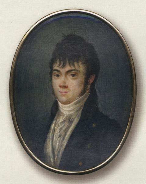 Alexander Vostokov (1783-1864)